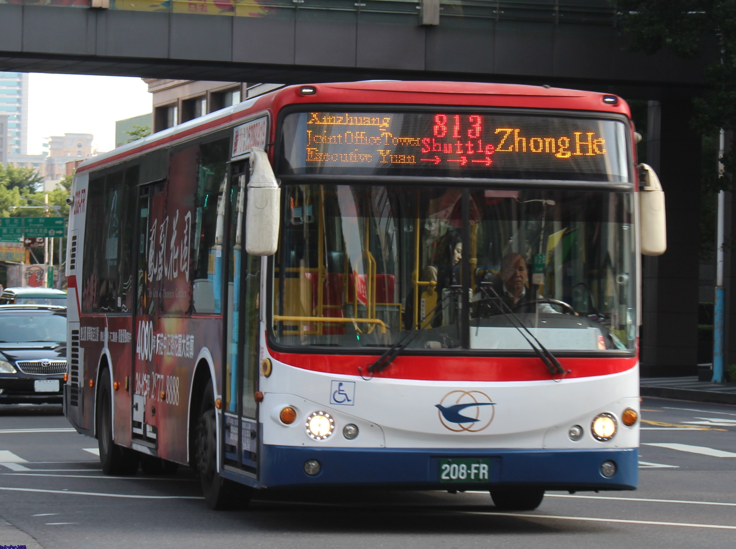 光華巴士2010 KINGLONG KL6112U1 208-FR 813區間車